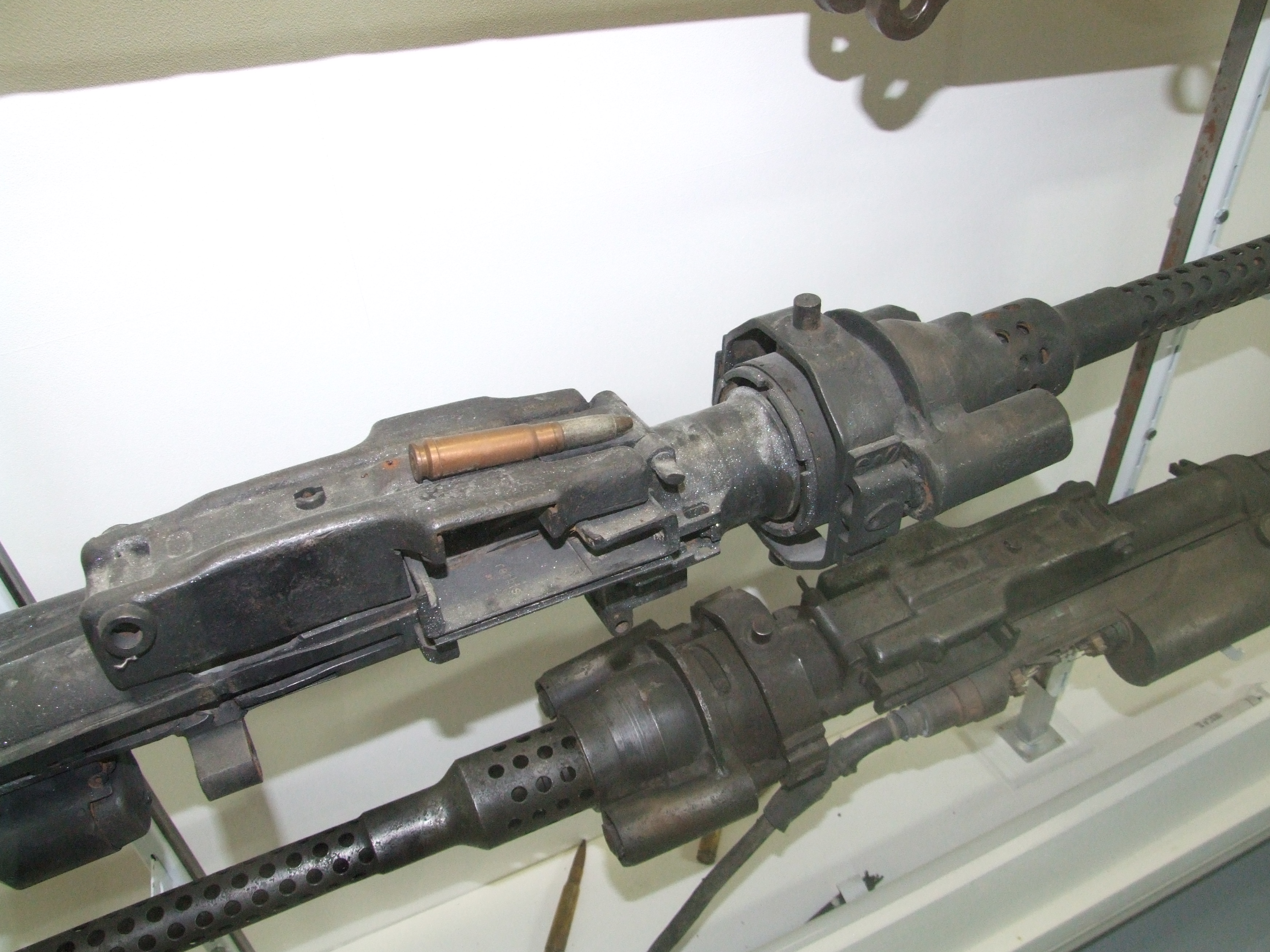 Rheinmetall Borsig MG 131 (13 mm) im Mémorial du Souvenir, Dünkirchen